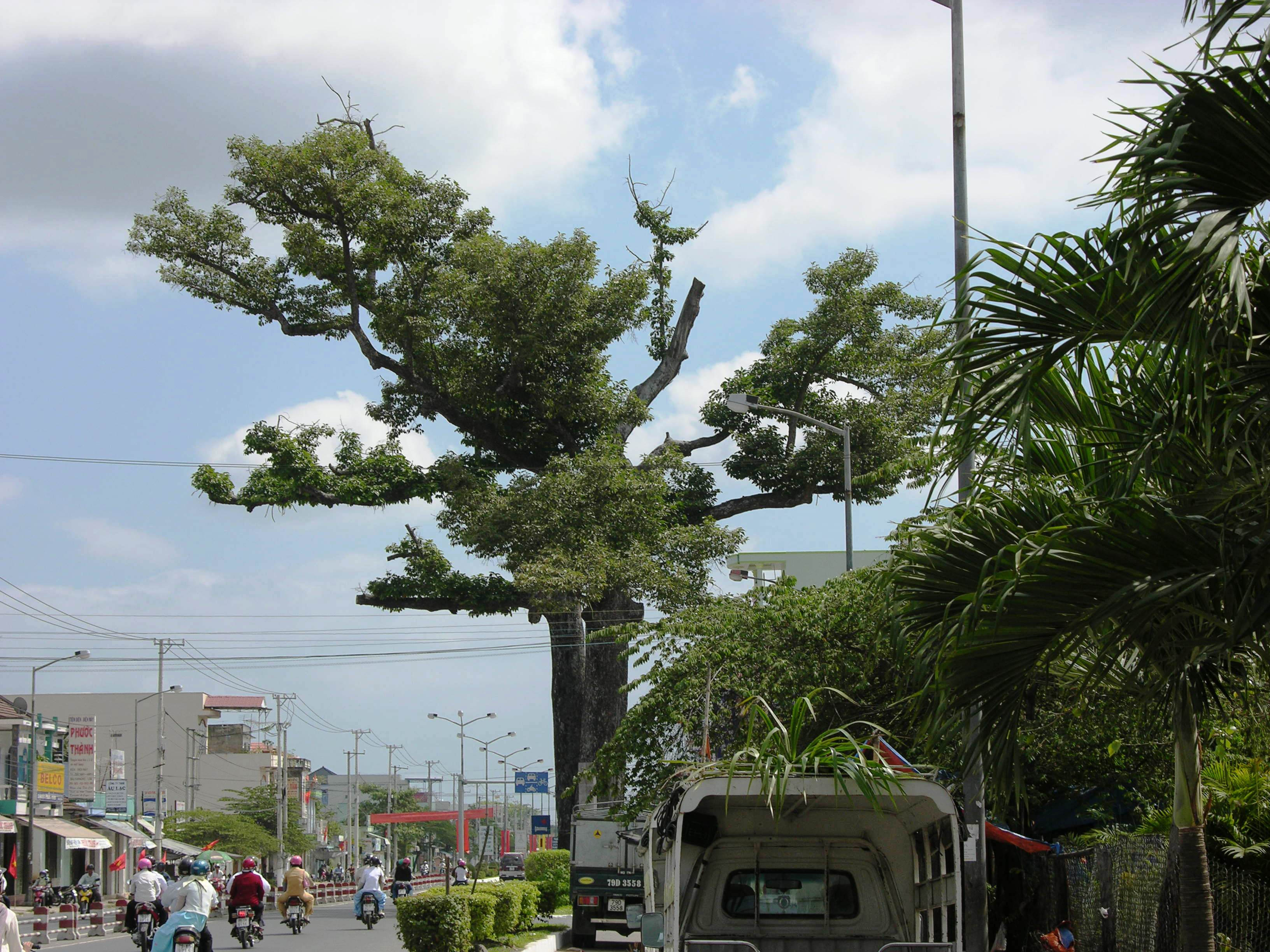 Cay Dau doi, a symbol of Dien Khanh, Khanh Hoa, Viet Nam